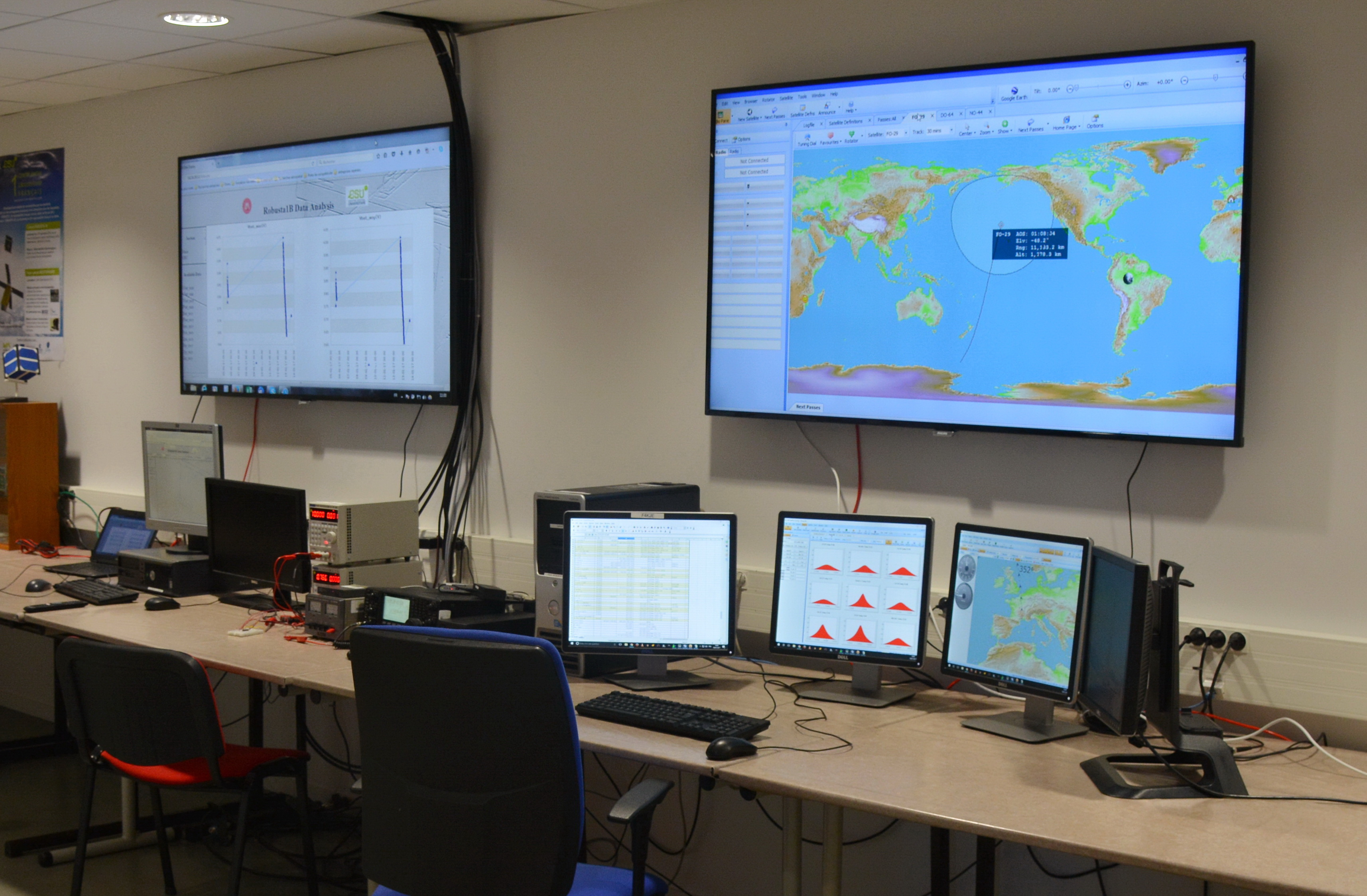 interieur de la station sol du Centre spatial universitaire Montpellier-Nîmes